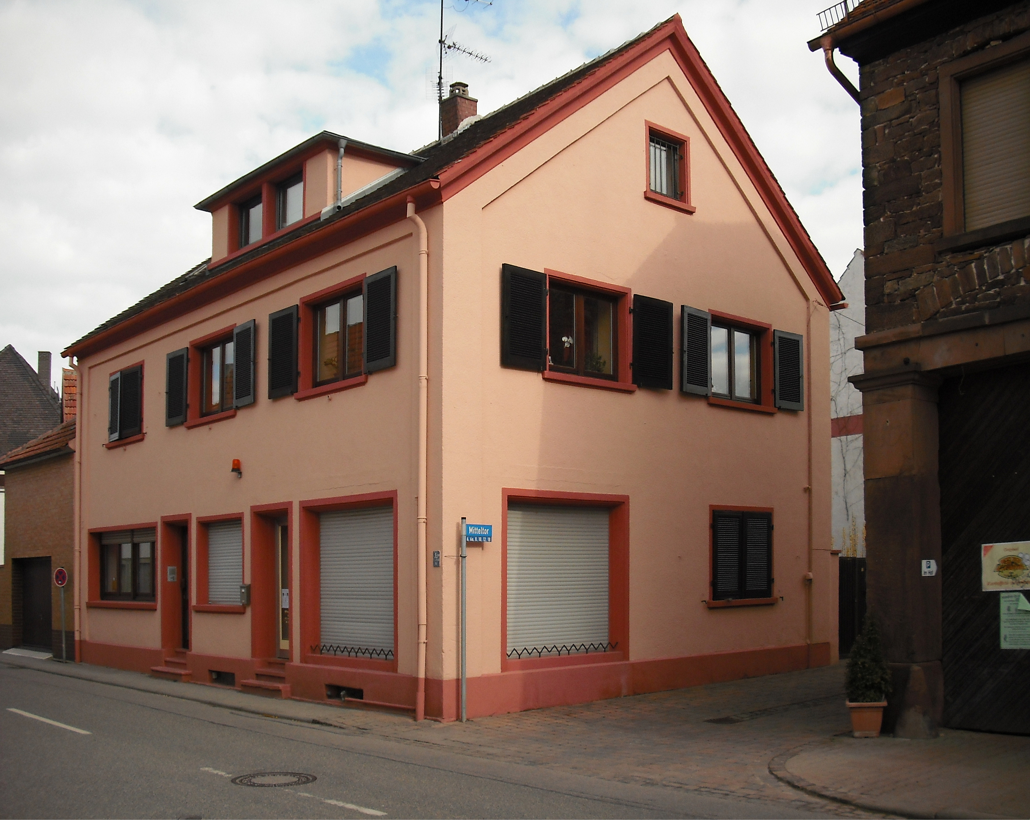 Ehemalige Synagoge von Dirmstein, aufgegeben um 1913, zum Wohnhaus umgebaut in den 1930er Jahren